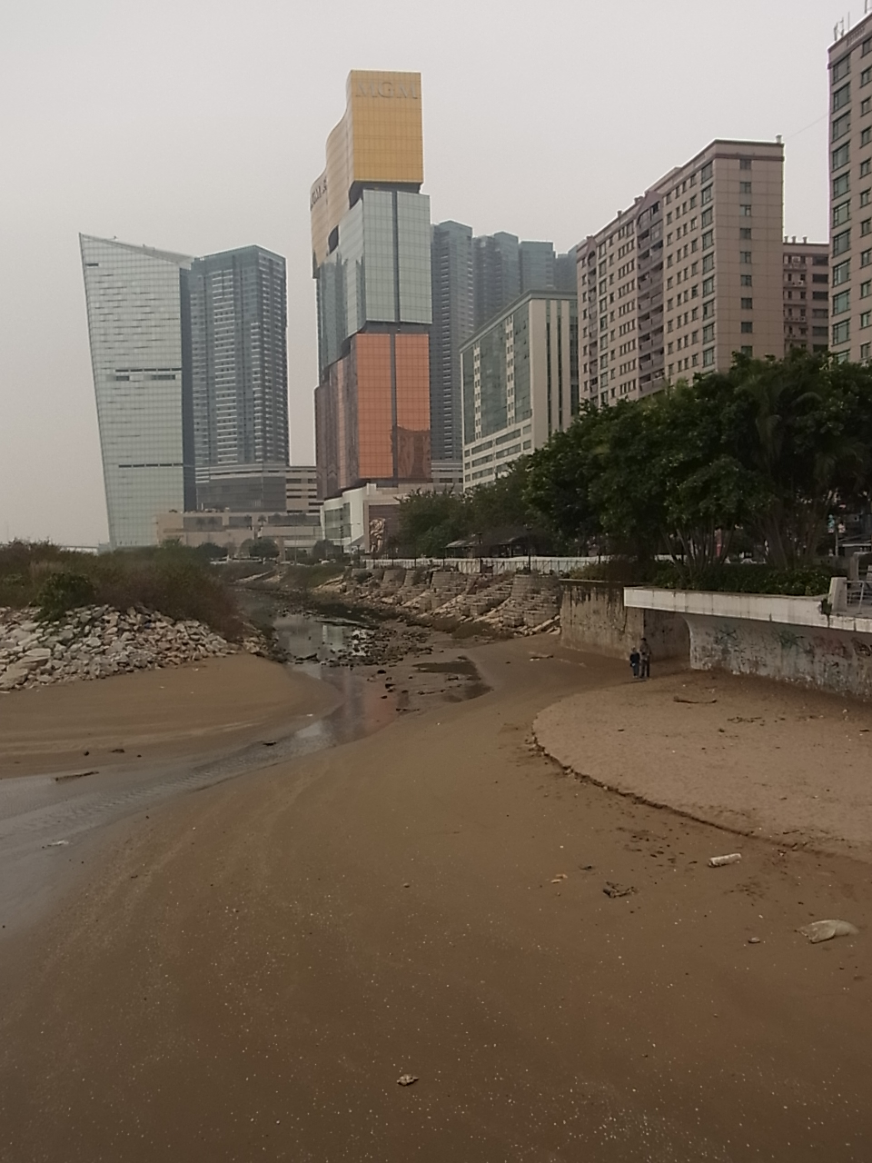 中文（香港）: 澳門新口岸一未用填海地